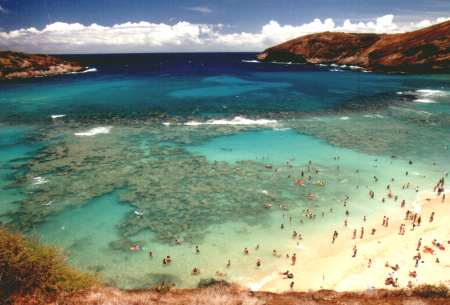 Hanauma Bay